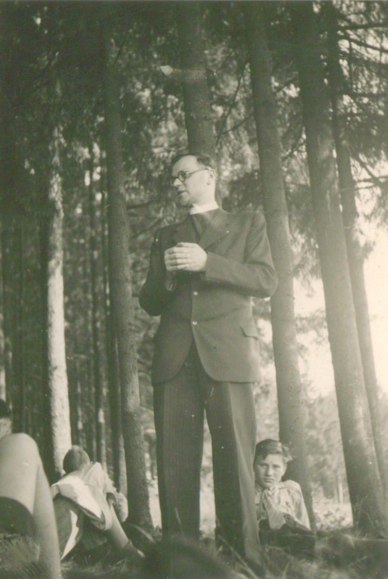 Jan Filip v lese, 10. července 1941.